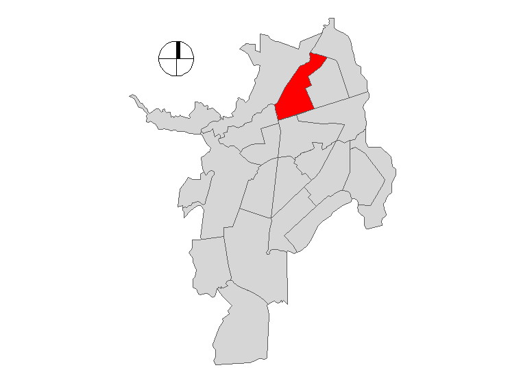 Comuna 4 de Santiago de Cali, Colombia.